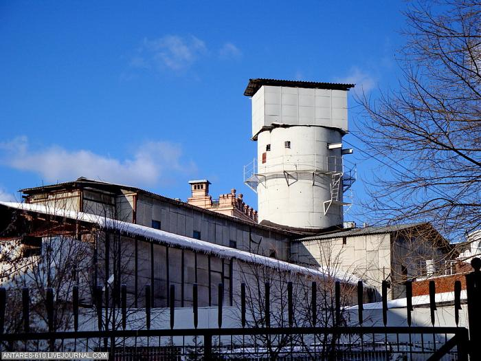 Строительная площадка № 732 с шахтным стволом подземной транспортной системы специального назначения. Строительство ведёт ОАО Трансинжстрой.